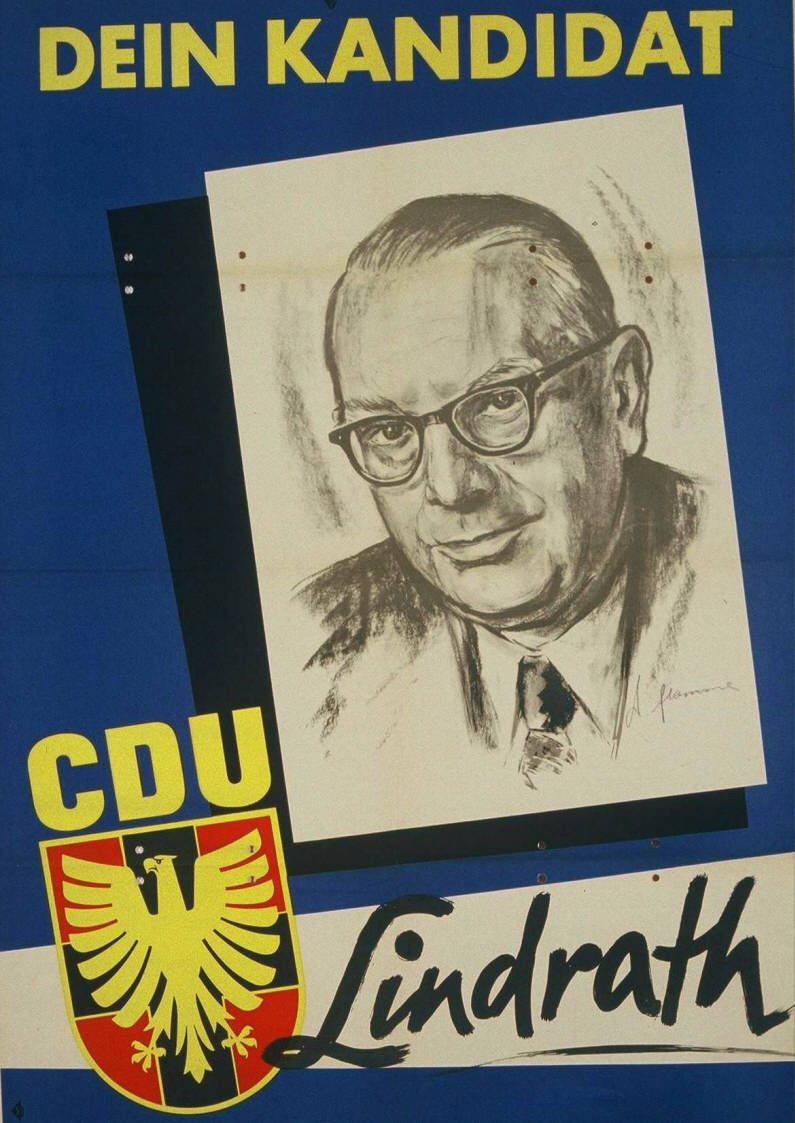 Dein KandidatAbbildung:PorträtzeichnungPlakatart:Kandidaten-/Personenplakat mit PorträtObjekt-Signatur:10-001: 773Bestand:Plakate zu Bundestagswahlen (10-001)GliederungBestand10-18:Plakate zu Bundestagswahlen (10-001) » Die 3. Bundestagswahl am 15. September 1957 » CDU » Mit PorträtfotoLizenz:KAS/ACDP 10-001: 773 CC-BY-SA 3.0 DE